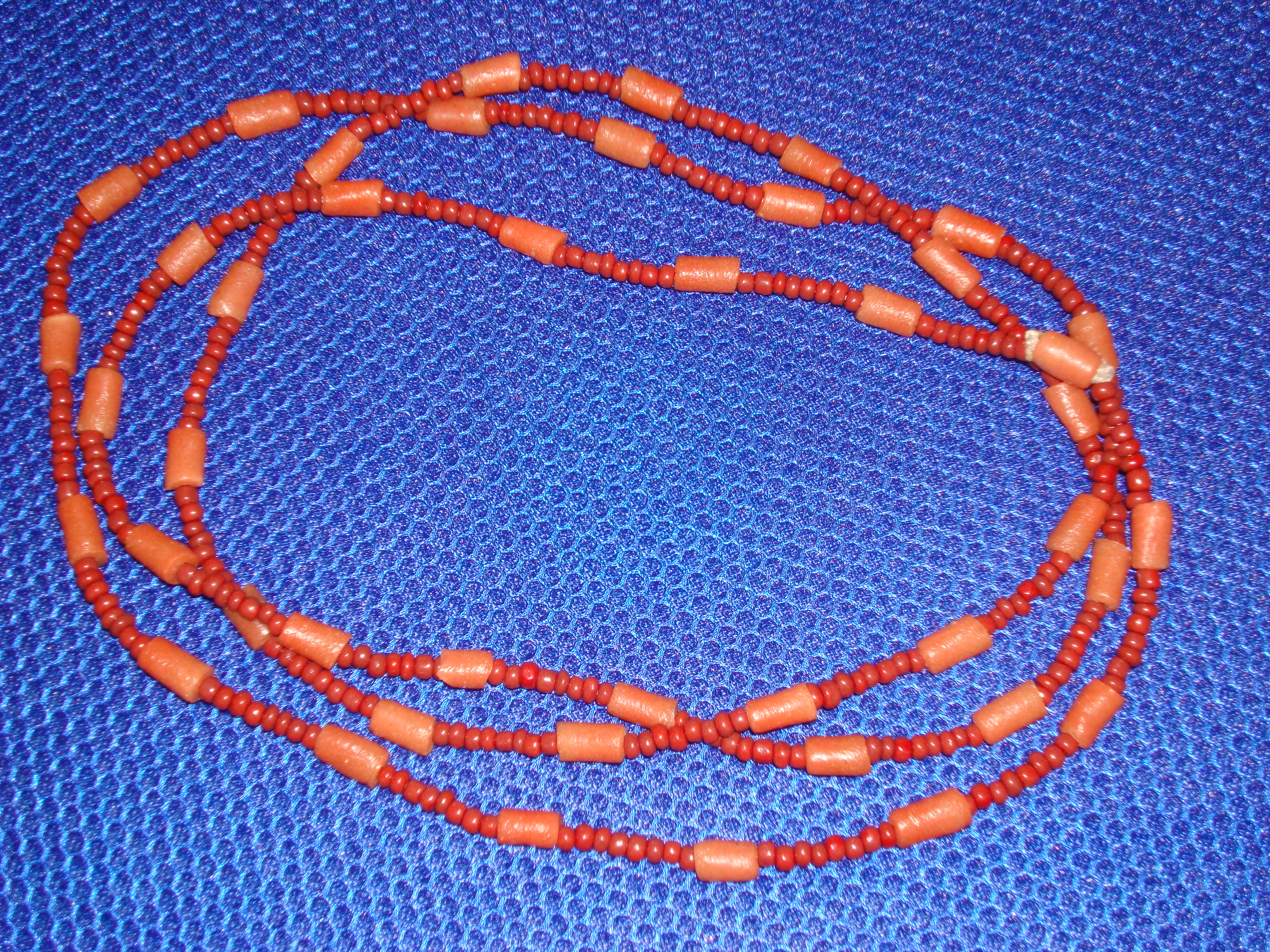 Rumjebe Afro Brasileiro, Candomblé, Bahia, Brasil